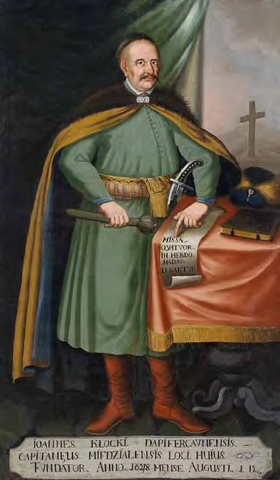 Беларуская (тарашкевіца): Партрэт Яна Клоцкага (Jan Kłocki)